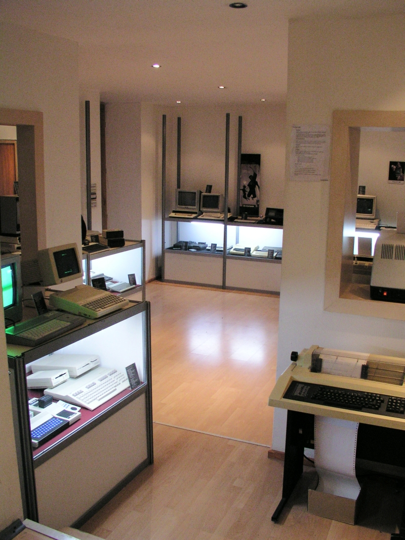 PEEK&POKE "muzej" starih računala i informatičke tehnologije u Rijeci